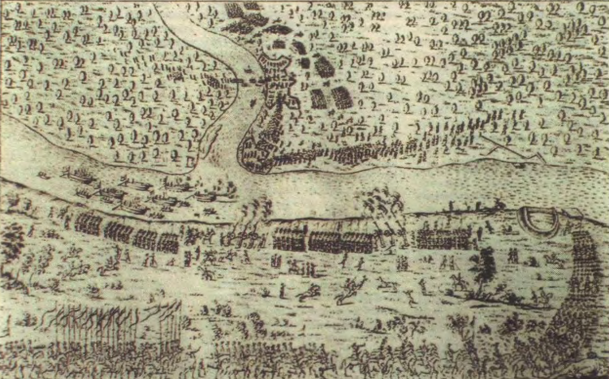 Лоевская битва. 1651 год.